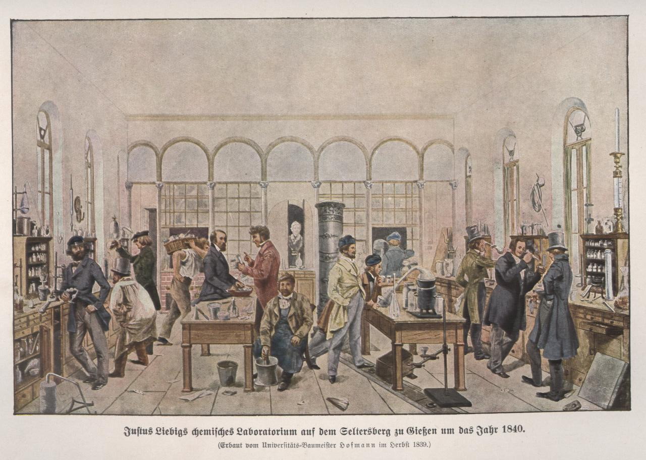 Justus von Liebigs Doktoranten in seinem Gießener Labor, um 1841 (heute Liebig-Museum)